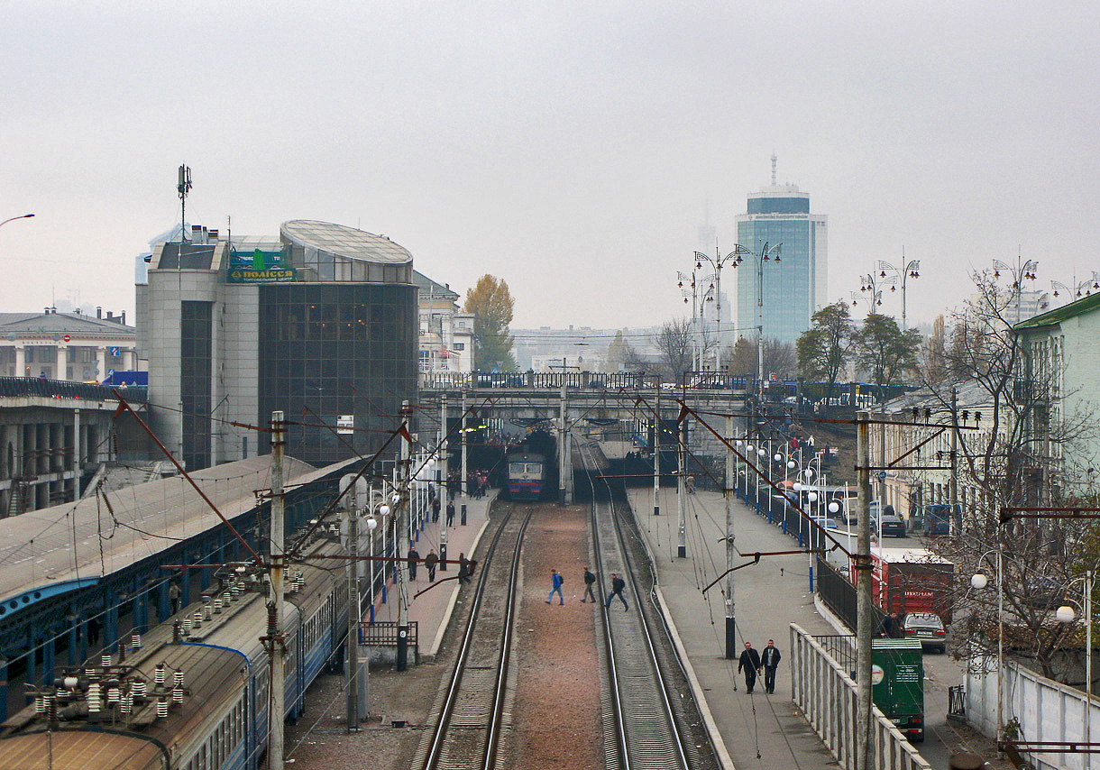 Північні платформи, ст. Київ-Товарний